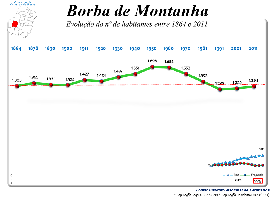 Censos 1864/2011